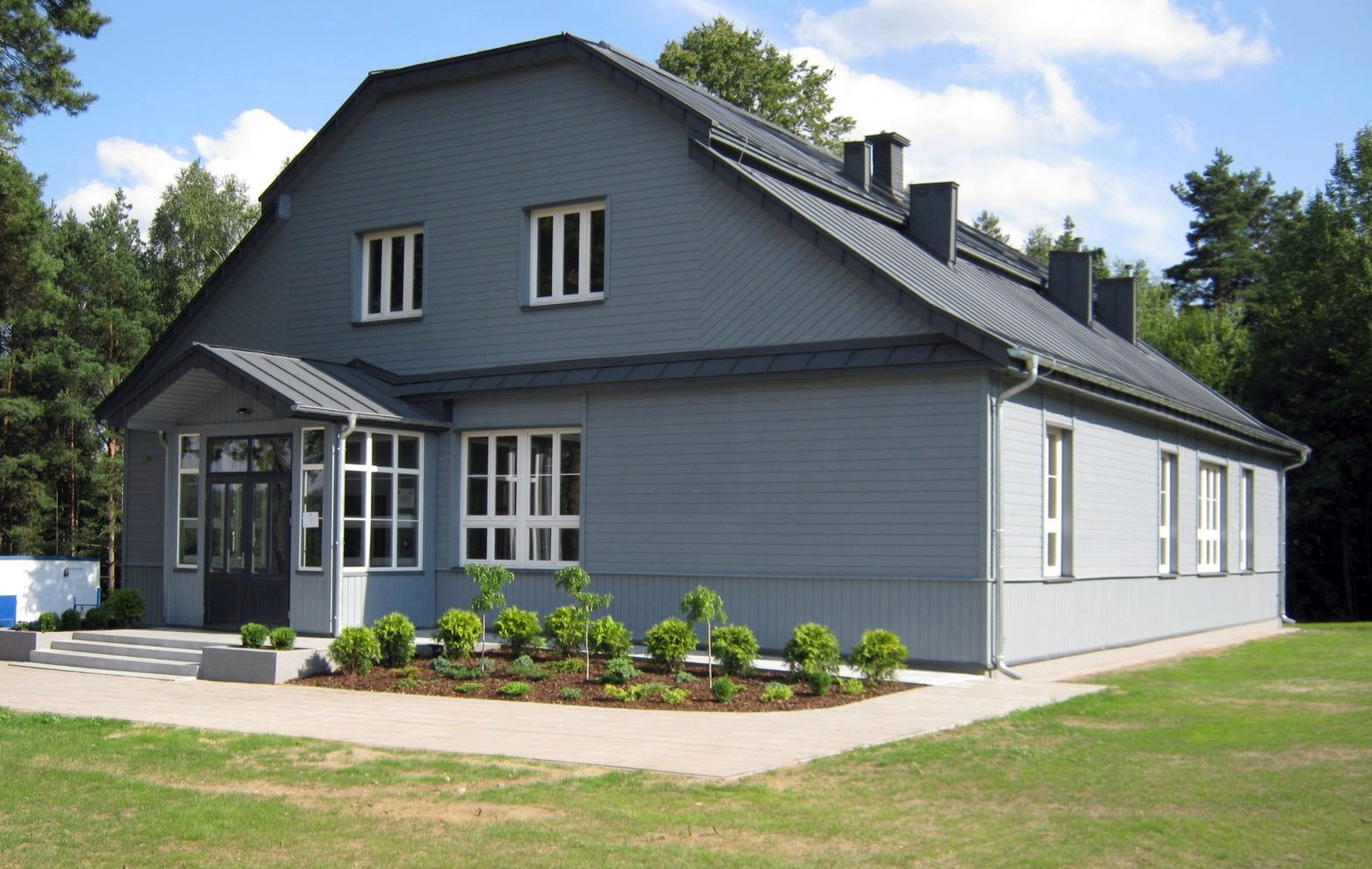 Dom Ludowy po remoncie kapitalnym